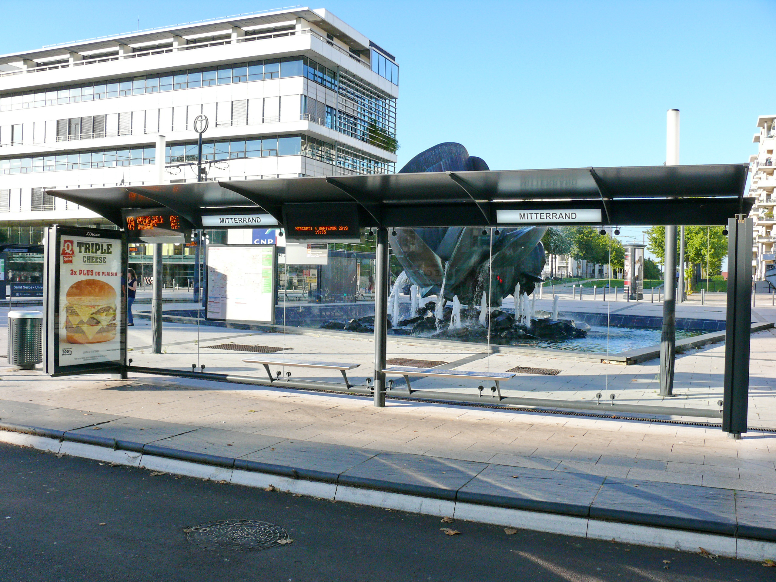 Mobilier de la station François Mitterrand du réseau de bus d'Angers (réseau Irigo)